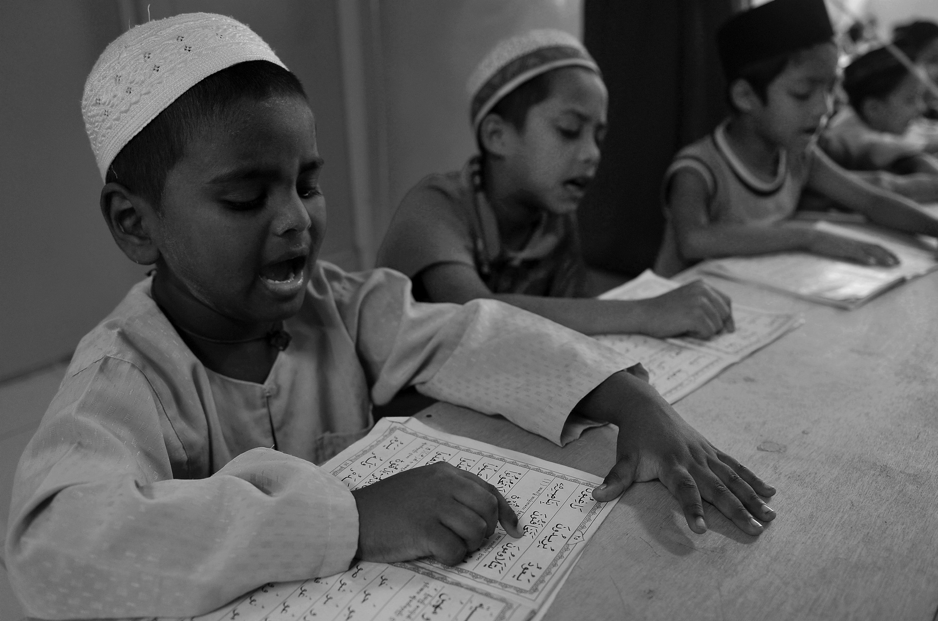 ROHINGYA: Hashimiah Orphans Madrasah at Pasar borong Selayang. Pic Firdaus Latif